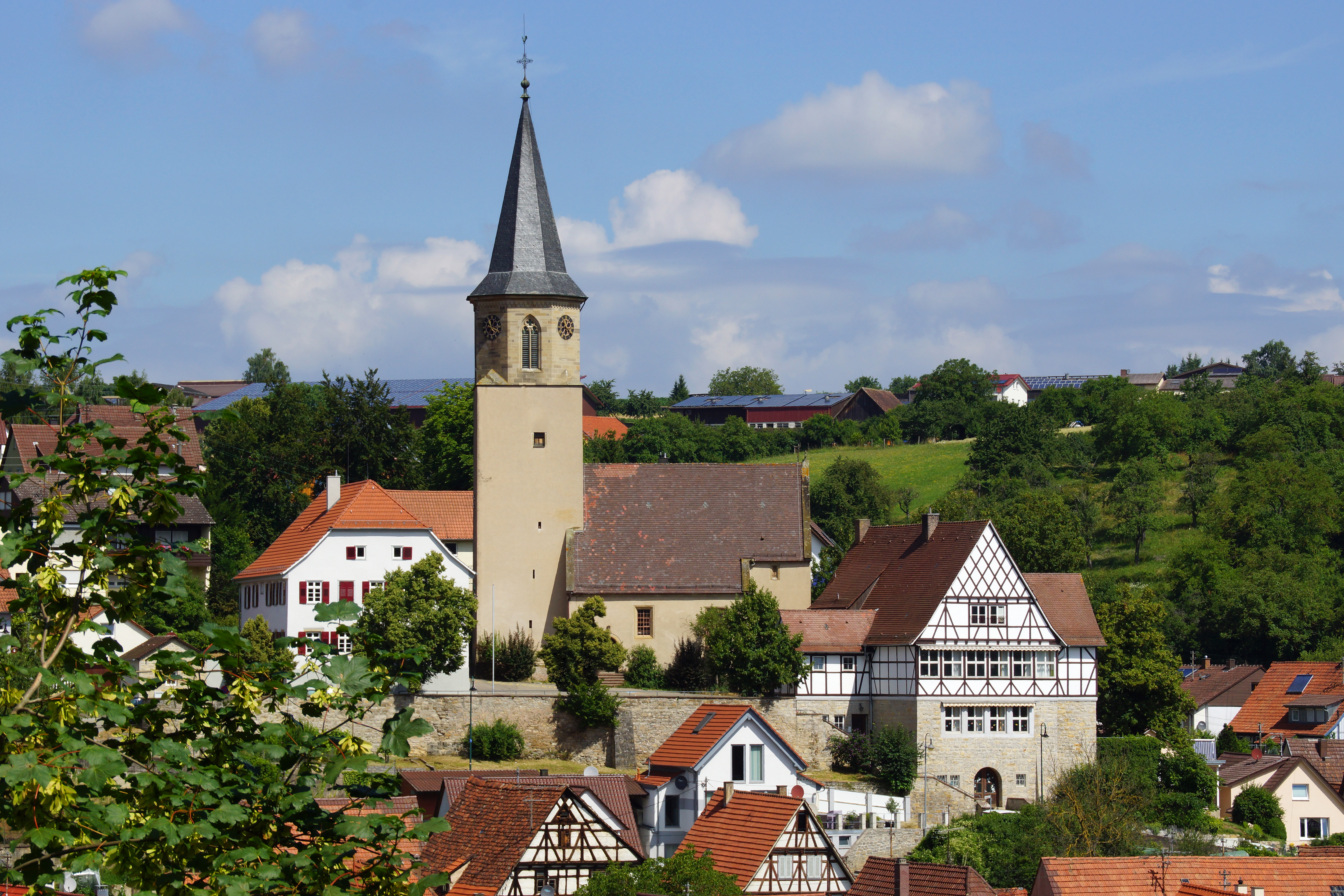 Großglattbach 07/2016